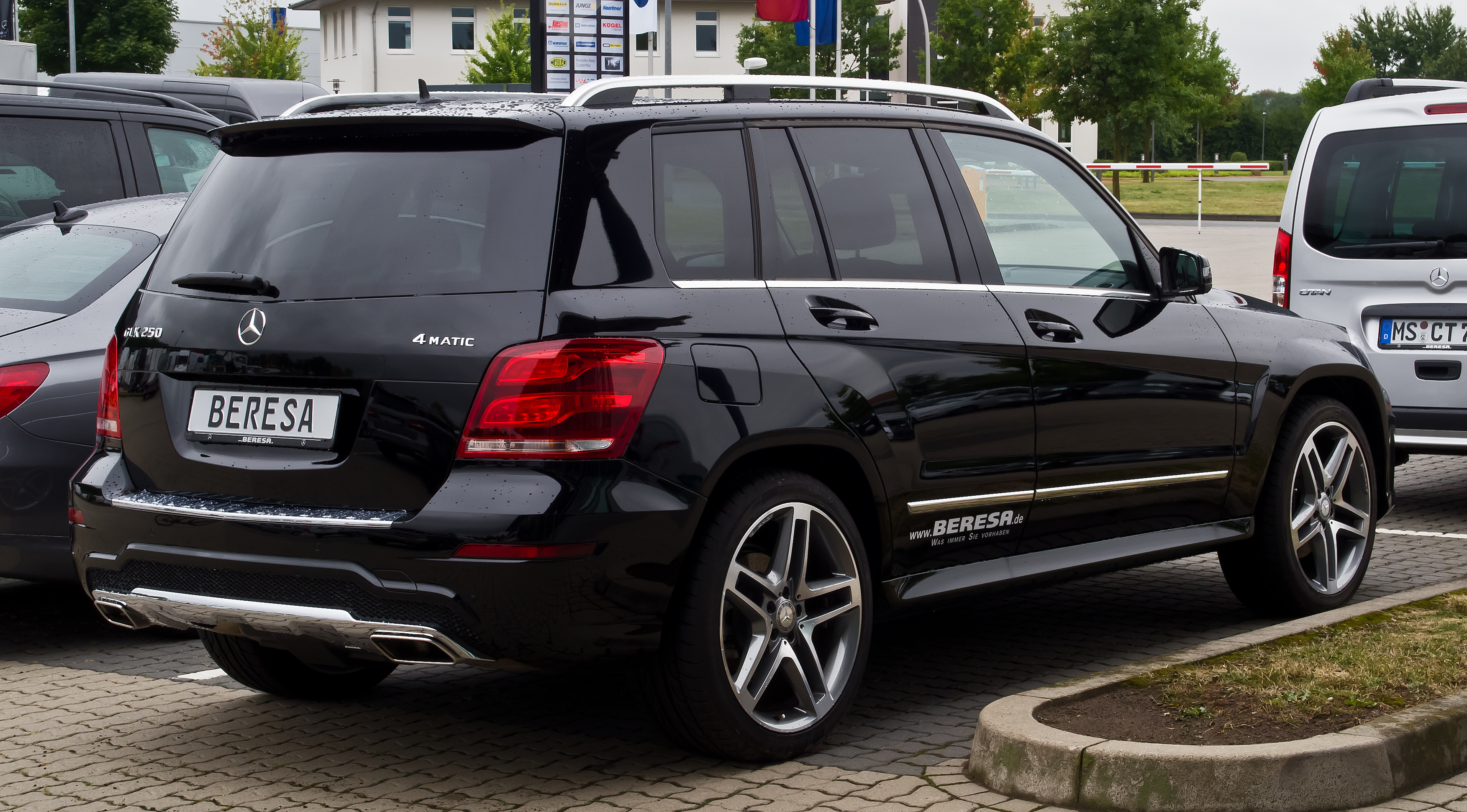 Mercedes-Benz GLK 250 4MATIC Sport-Paket AMG (X 204, Facelift)